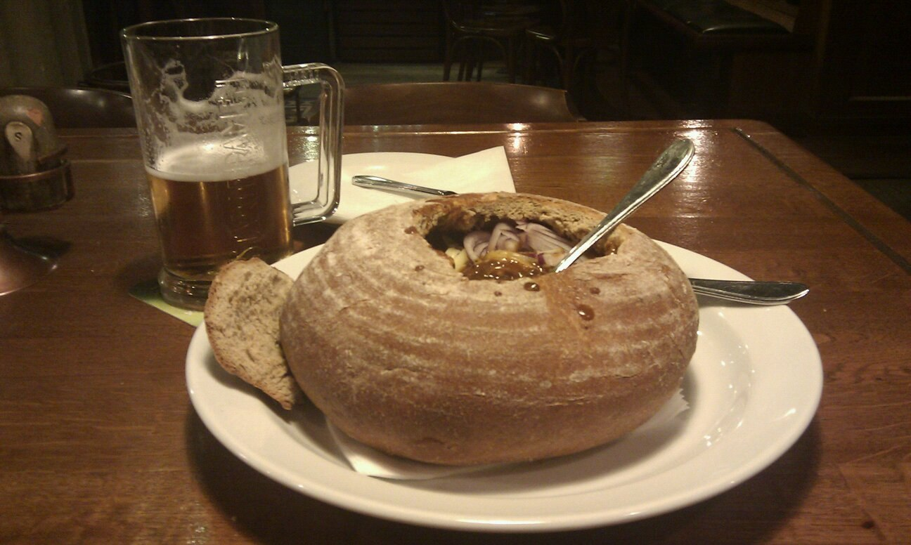 Суп в хлебе (Polevka)